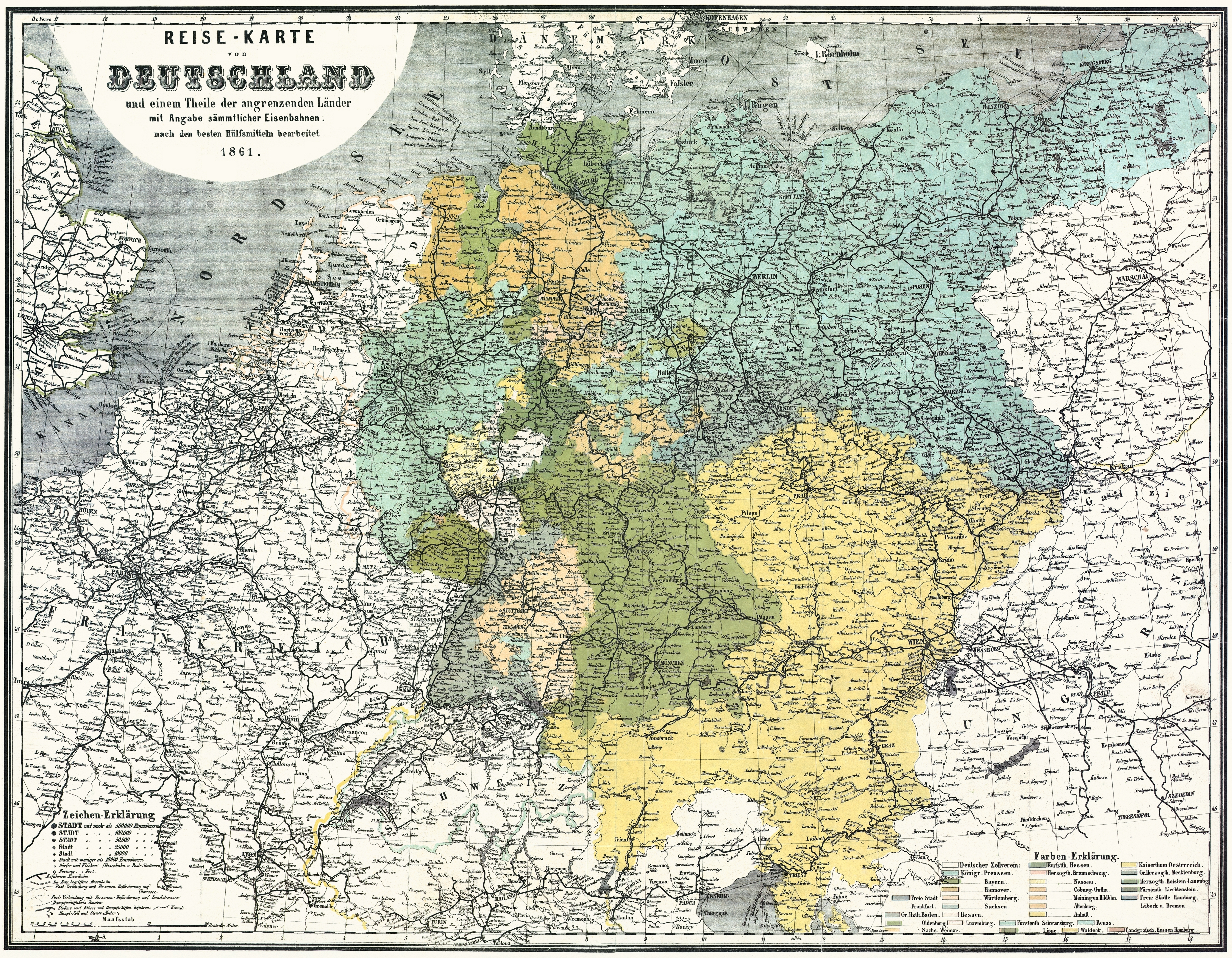 Bahnkarte_Deutschland_1861